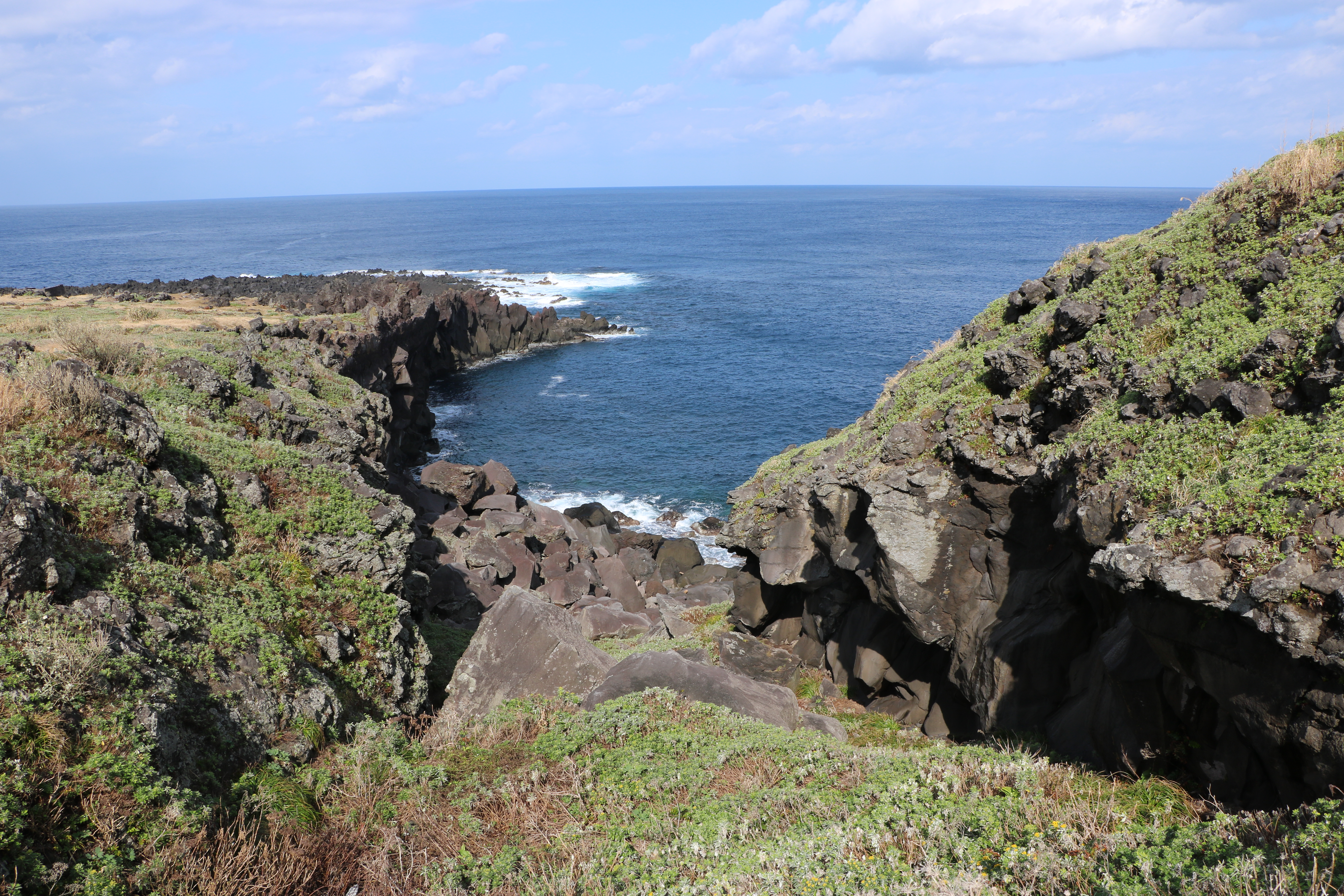 八丈小島の鳥打地区船着き場の眺め（東京都八丈町）